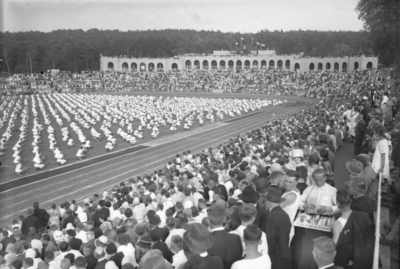 Das grosse Brandenburgische Kreis-Turnfest im Stadion in Frankfurt a./O.! Zehntausende von Turnern und Turnerinnen zeigten im Frankfurter Stadion Massen-Freiübungen. Blick von den Tribünen in das Stadion in Frankfurt a./O. während der Massenfreiübungen.